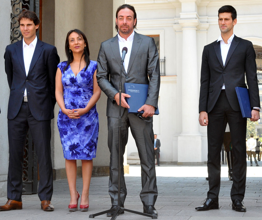 Rafael Nadal, Nicolás Massú, Novak Djoković, en conferencia en La Moneda.